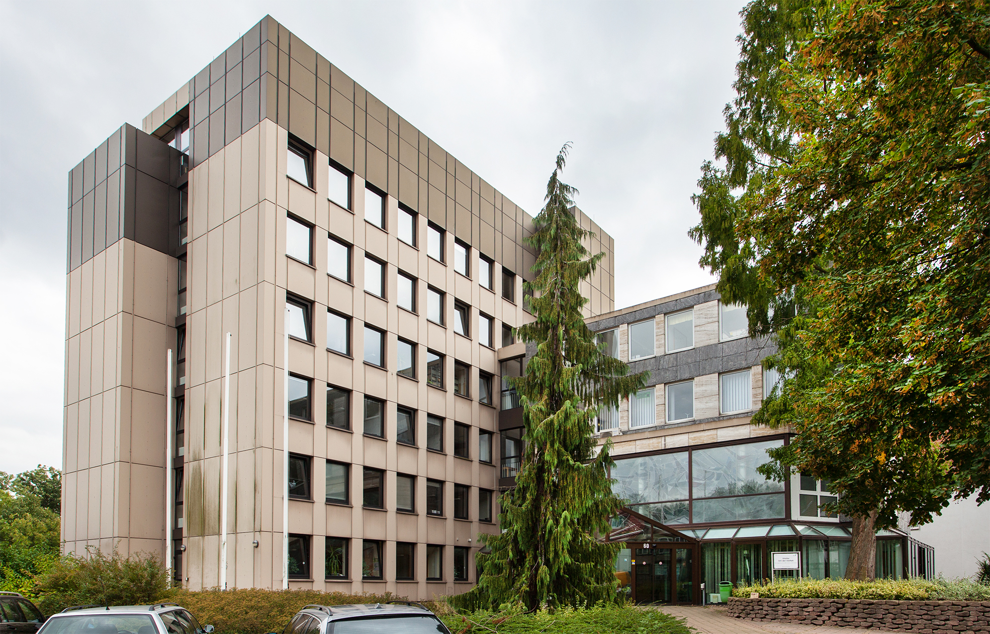 Rathaus in Vlotho, Kreis Herford